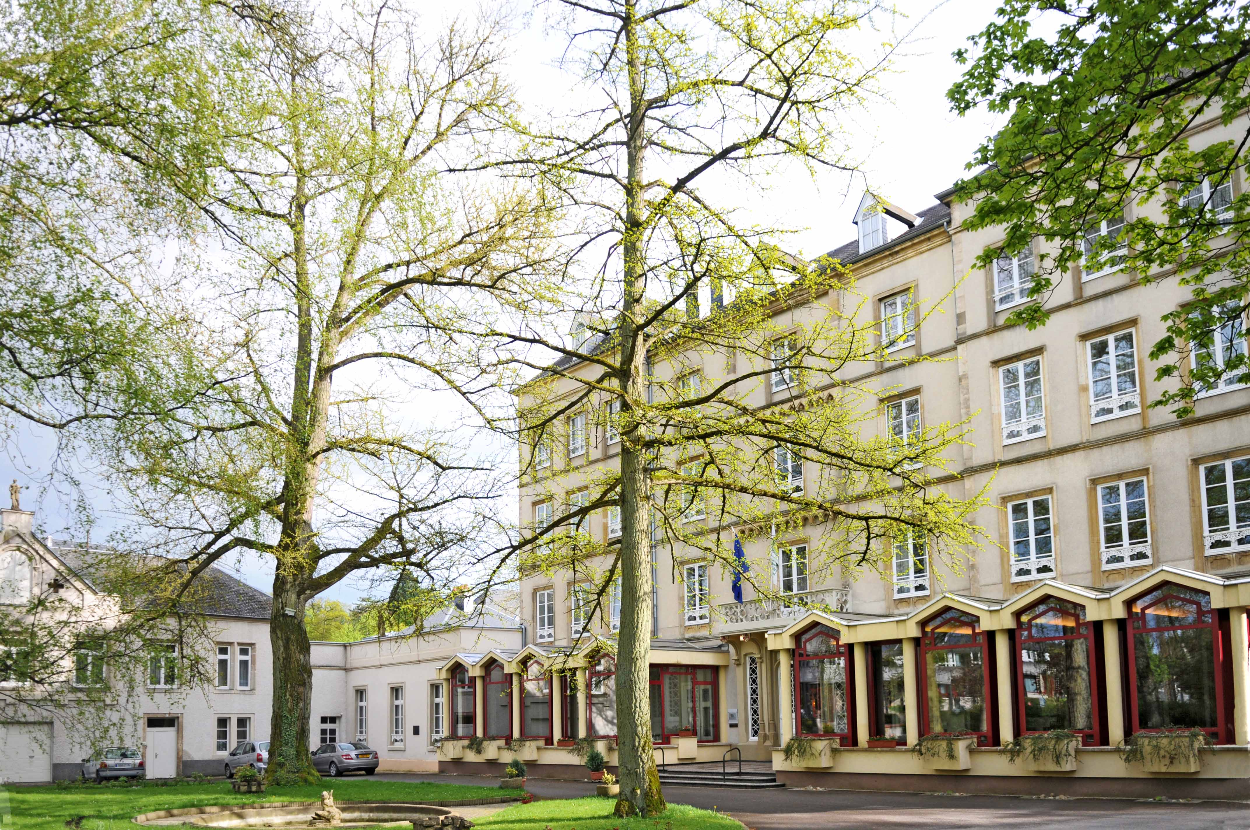 Ginkgoen am Park vum Hotel Grand Chef zu Munneref. Kategorie:Gemeng Munneref